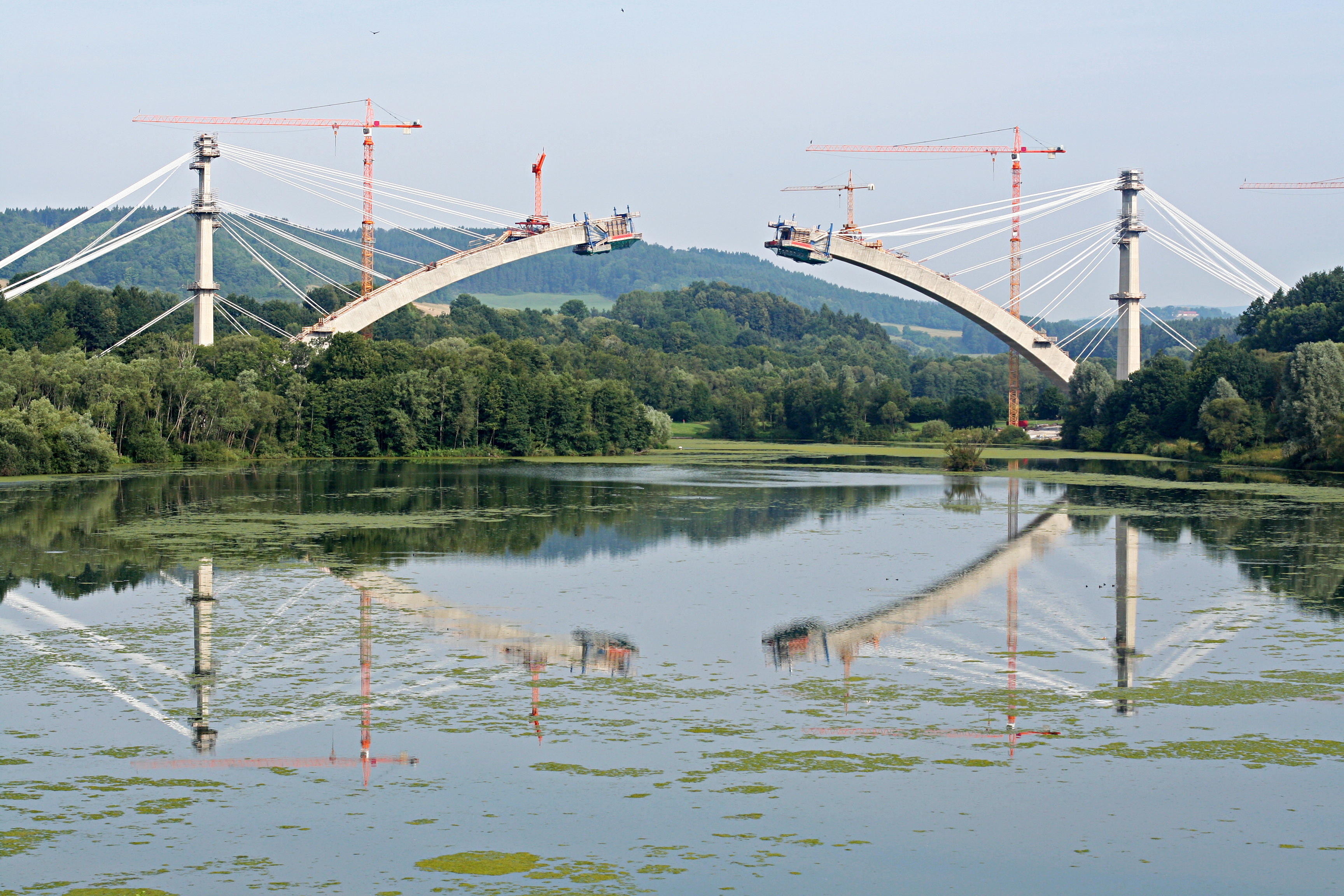 Talbrücke Froschgrundsee Landkreis Coburg, Blickrichtung Norden